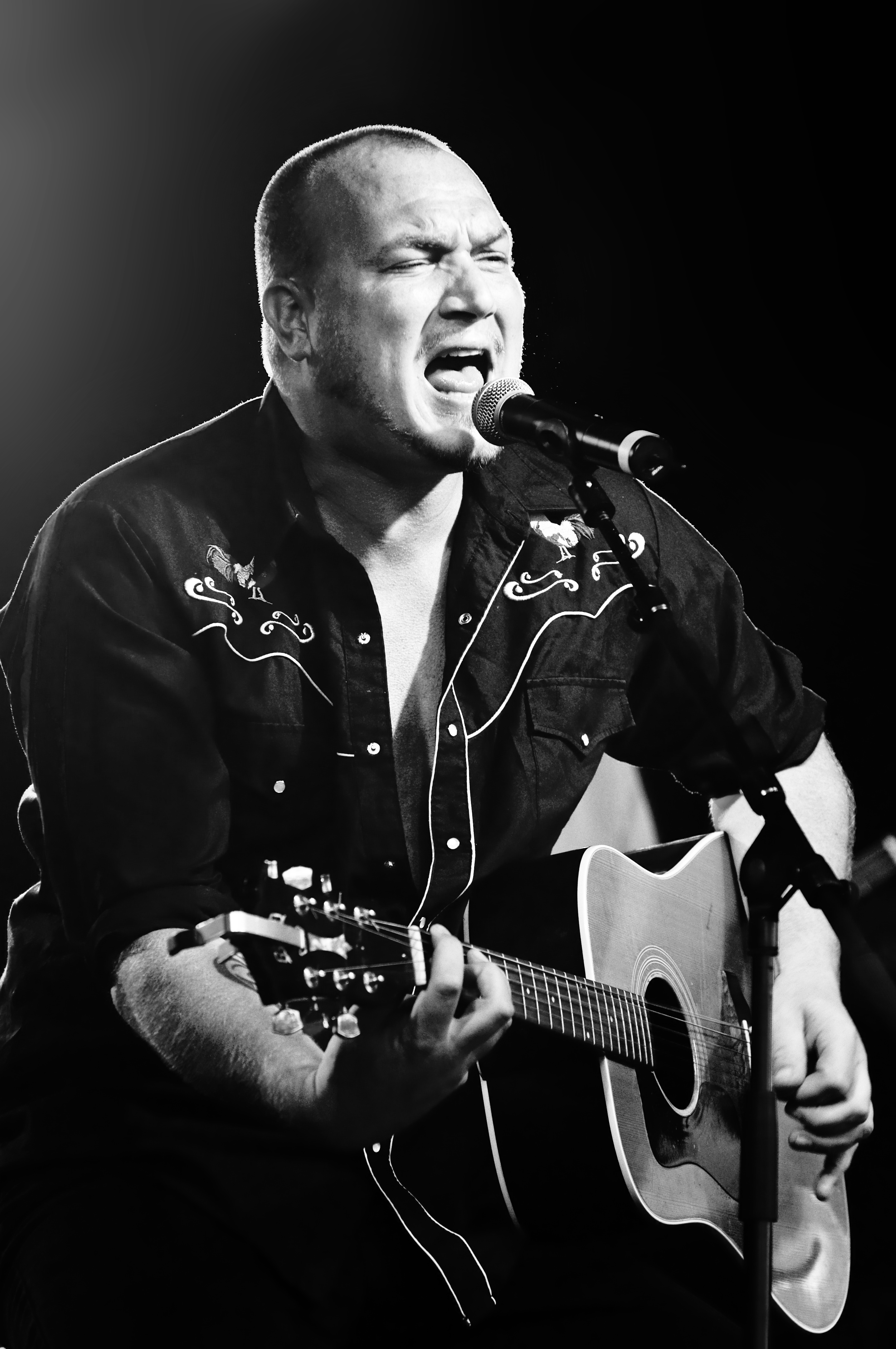 Denvis (artiestennaam van Dennis Grotenhuis)